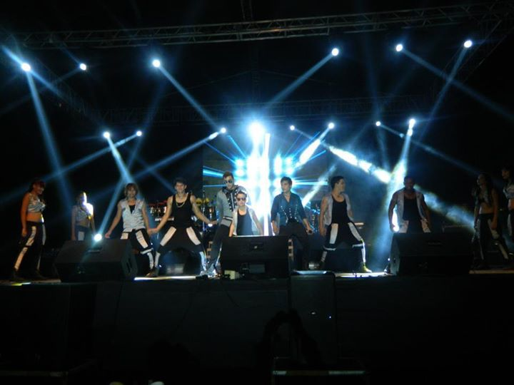 en el concierto junto a Chino y nacho